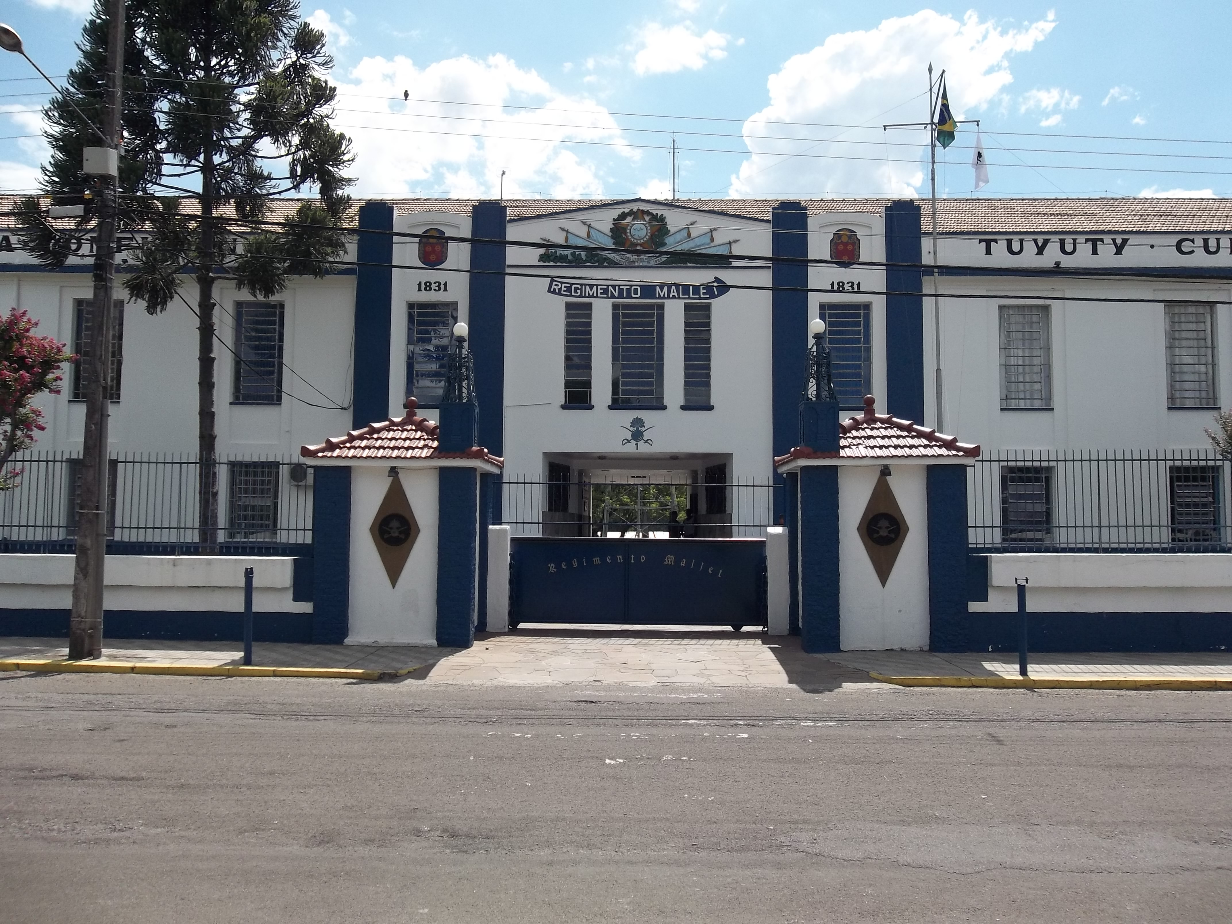 Regimento Mallet, Passo d'Areia, Sede, Santa Maria, Rio Grande do Sul, Brasil